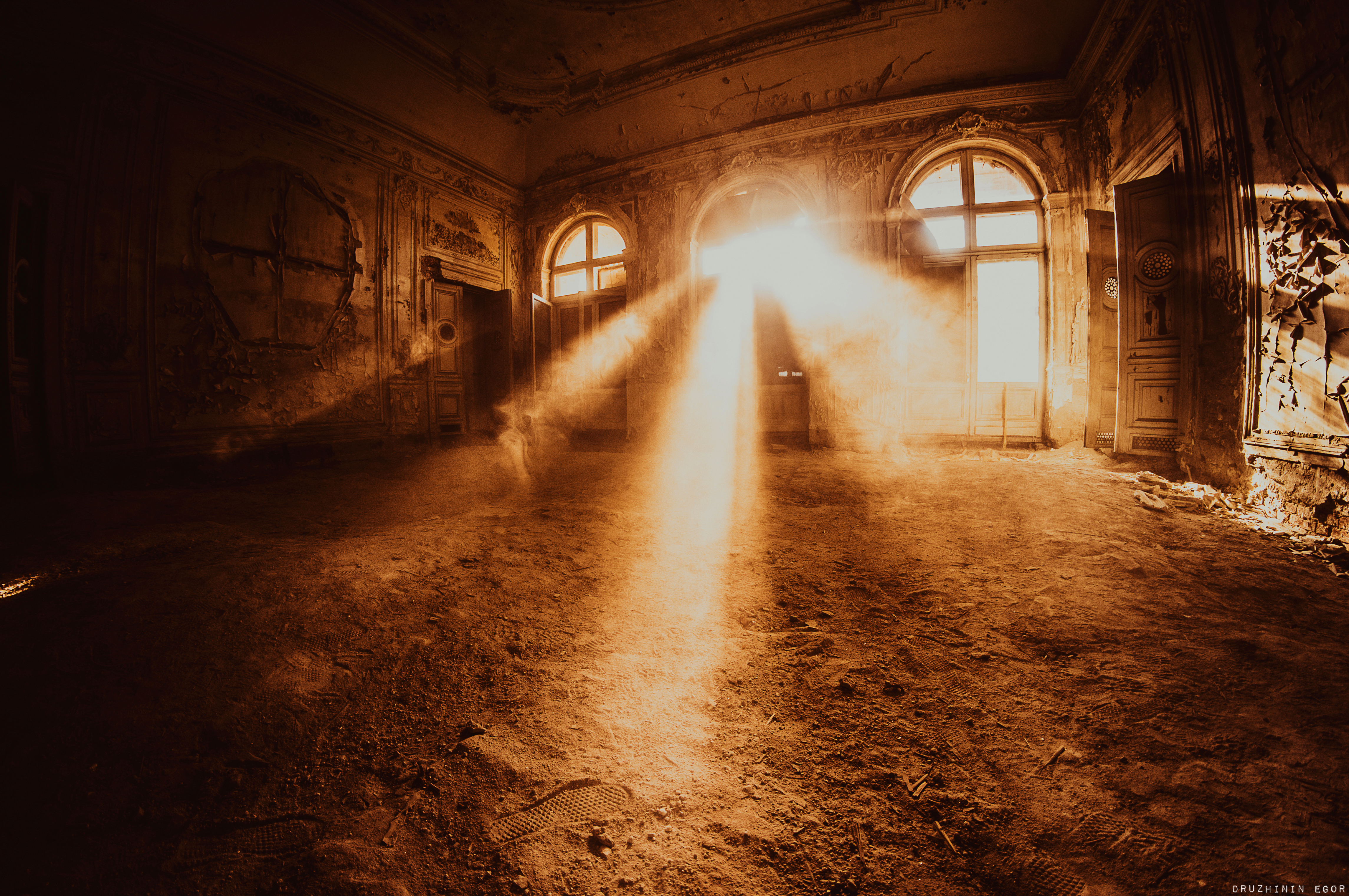 Дворец великого князя Николая Николаевича (Петергоф, Санкт-Петербургское шоссе, 115)